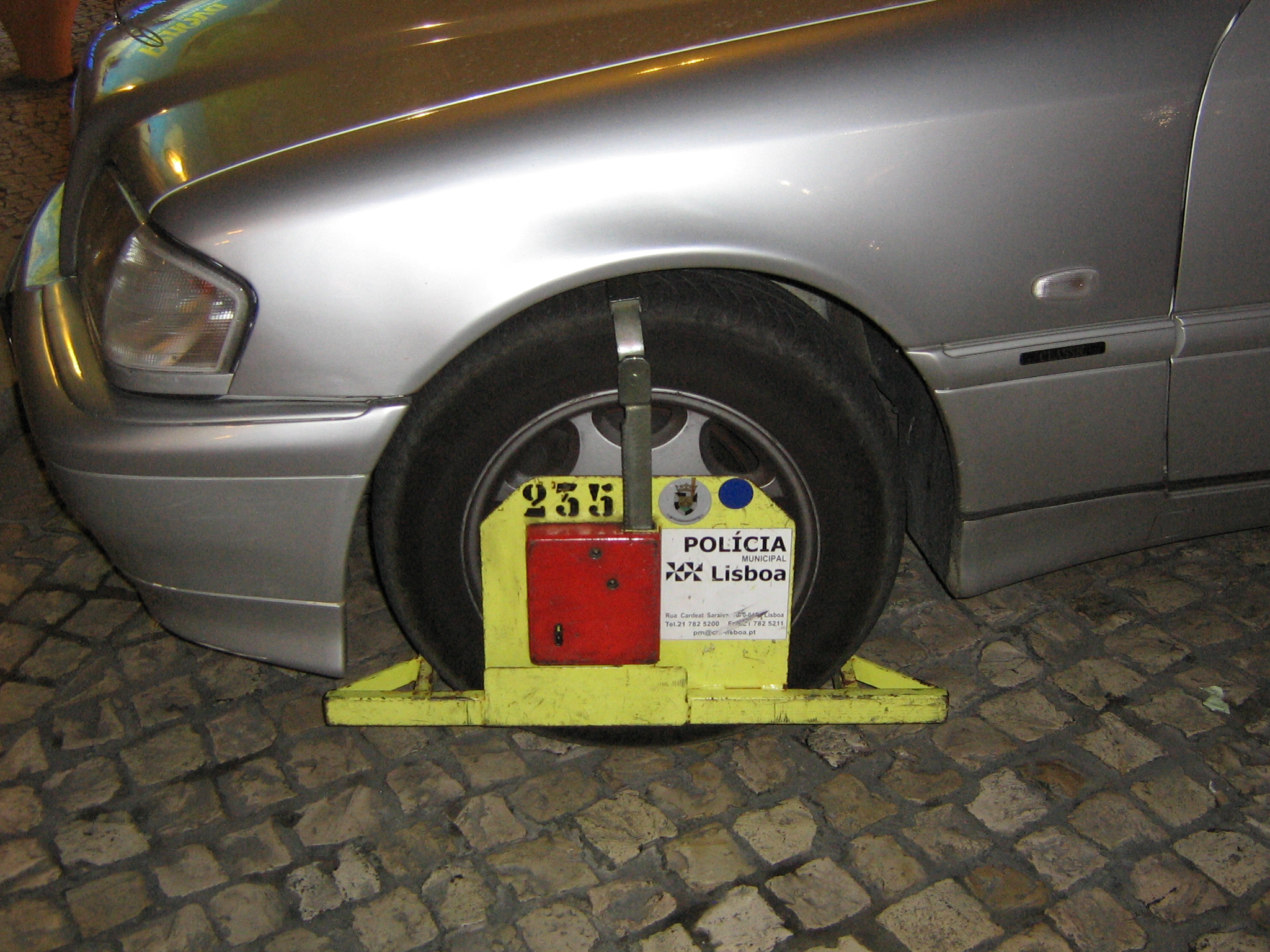 Cepo para inmovilizar automóviles que se hallan estacionados de forma ilegal.